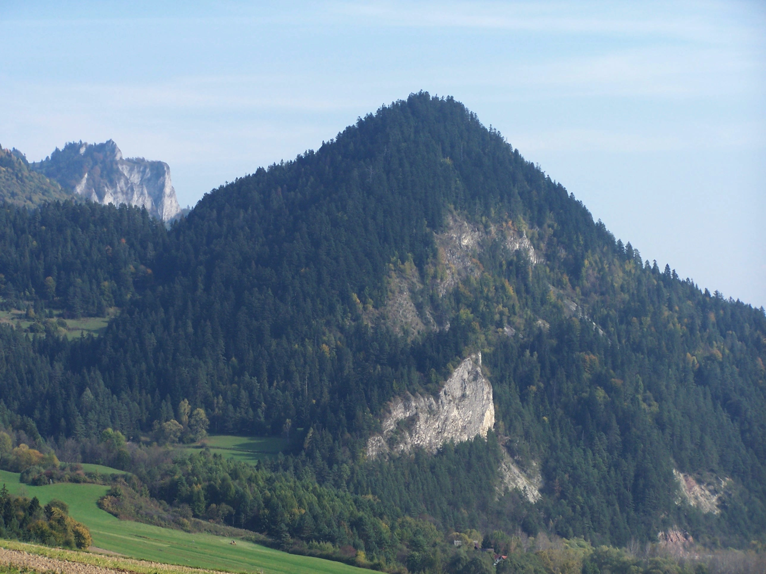 Macelowa Góra (Pieniny Czorsztyńskie))